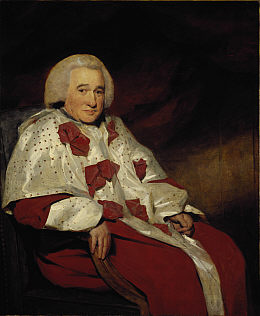 Robert Macqueen, Lord Braxfield (1722-1799)